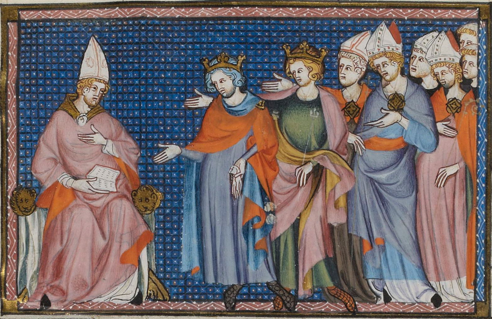 Enluminure du manuscrit Vie et miracles de saint Louis, XIVe siècle, Bibliothèque nationale de France, Français 5716, fol. 9 verso.